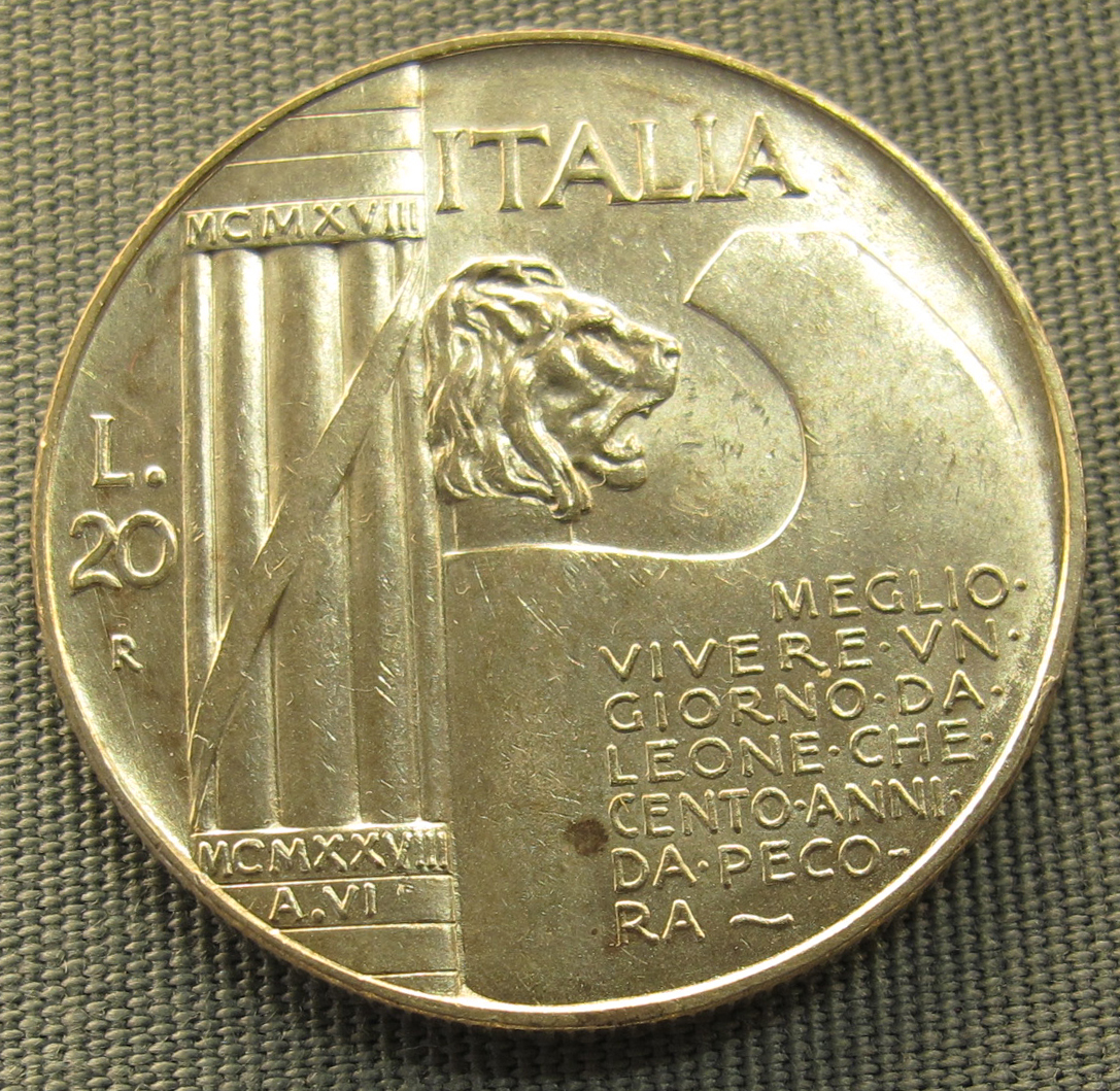 Italia, 20 lire di vittorio emanuele III, 1928